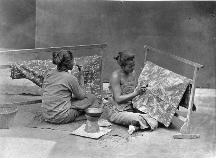 Foto. Batik is "een uitsparingstechniek waarbij was wordt aangebracht op de stofondergrond waarop verving volgt. Het opbrengen van de was gebeurt meestal met de tjanting [canting] (waspen), of met de tjap [cap] (handstempel)" (Alit Veldhuisen-Djajasoebrata, Bloemen van het heelal). Het maken van batik is een oude Javaanse traditie. Toen rond 1815 de eerste industrieel geproduceerde katoentjes uit Engeland op Java werden aangevoerd betekende dat in vele gevallen wel het einde van het lokale spinnen en weven, maar niet van de batik. Integendeel. Enerzijds maakte de batiksters graag gebruik van de fraaie industrieel geweven ongekleurde katoen uit Europa, anderzijds was de introductie van het goedkopere cap proces een antwoord op de goedkope 'prints' uit Europa. (P. Boomgaard, 2001). Twee Javaanse vrouwen bezig met het batikken van doeken Batiksters, ca. 1890